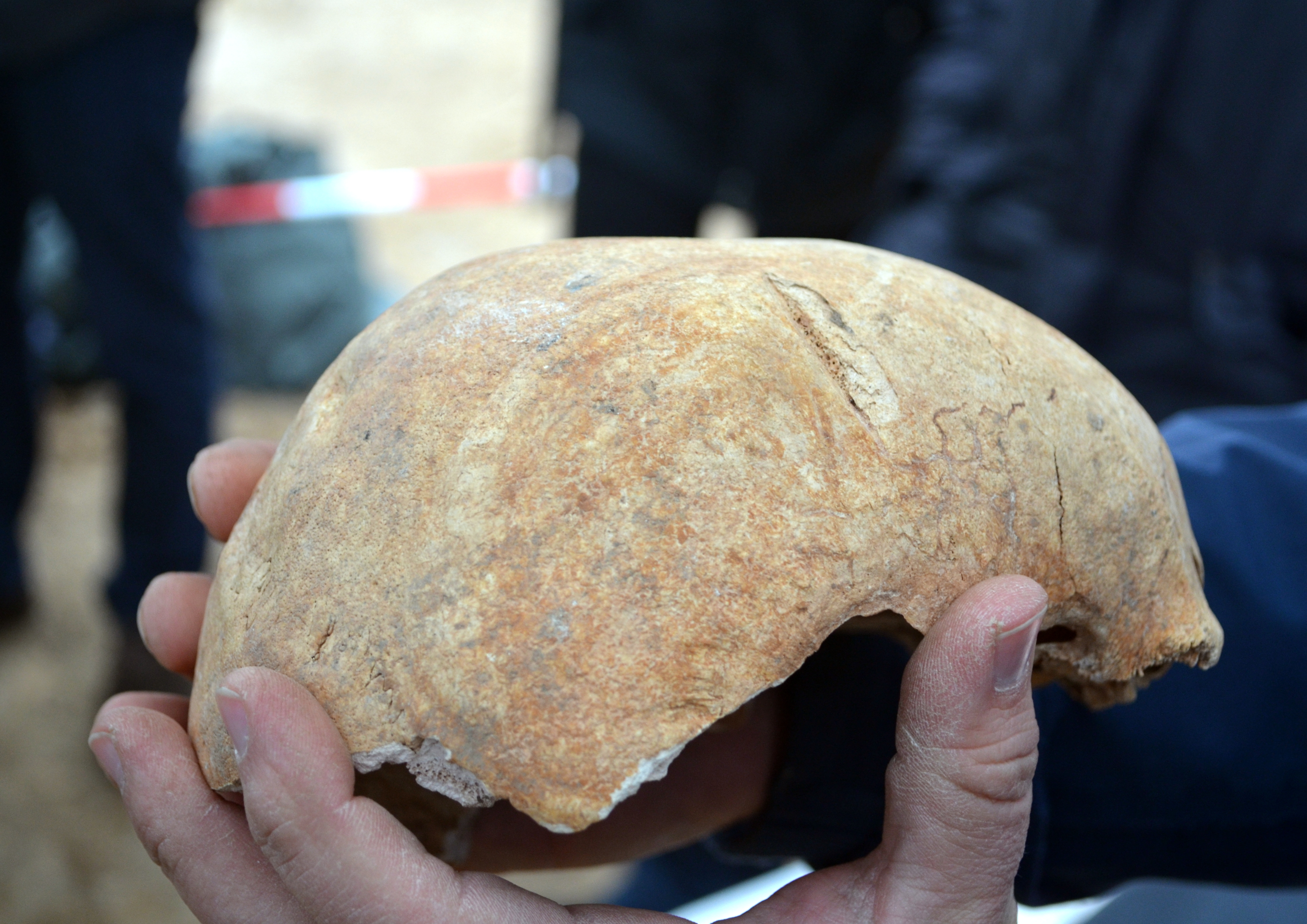 Braunschweig, Gelände des Georg-Eckert-Instituts, ehemalige Villa von Bülow: Bei Aushubarbeiten Anfang 2019 auf dem Instituts-Gelände (Teil des ehemaligen Friedhofs des Kreuzklosters) gefundene Schädelkalotte eines wohl über 50-jährigen Mannes mit höchstwahrscheinlich tödlicher Hiebverletzung durch einen Säbel.